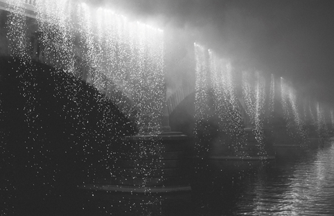 Gelatine silver print. Bromolejová fotografie.